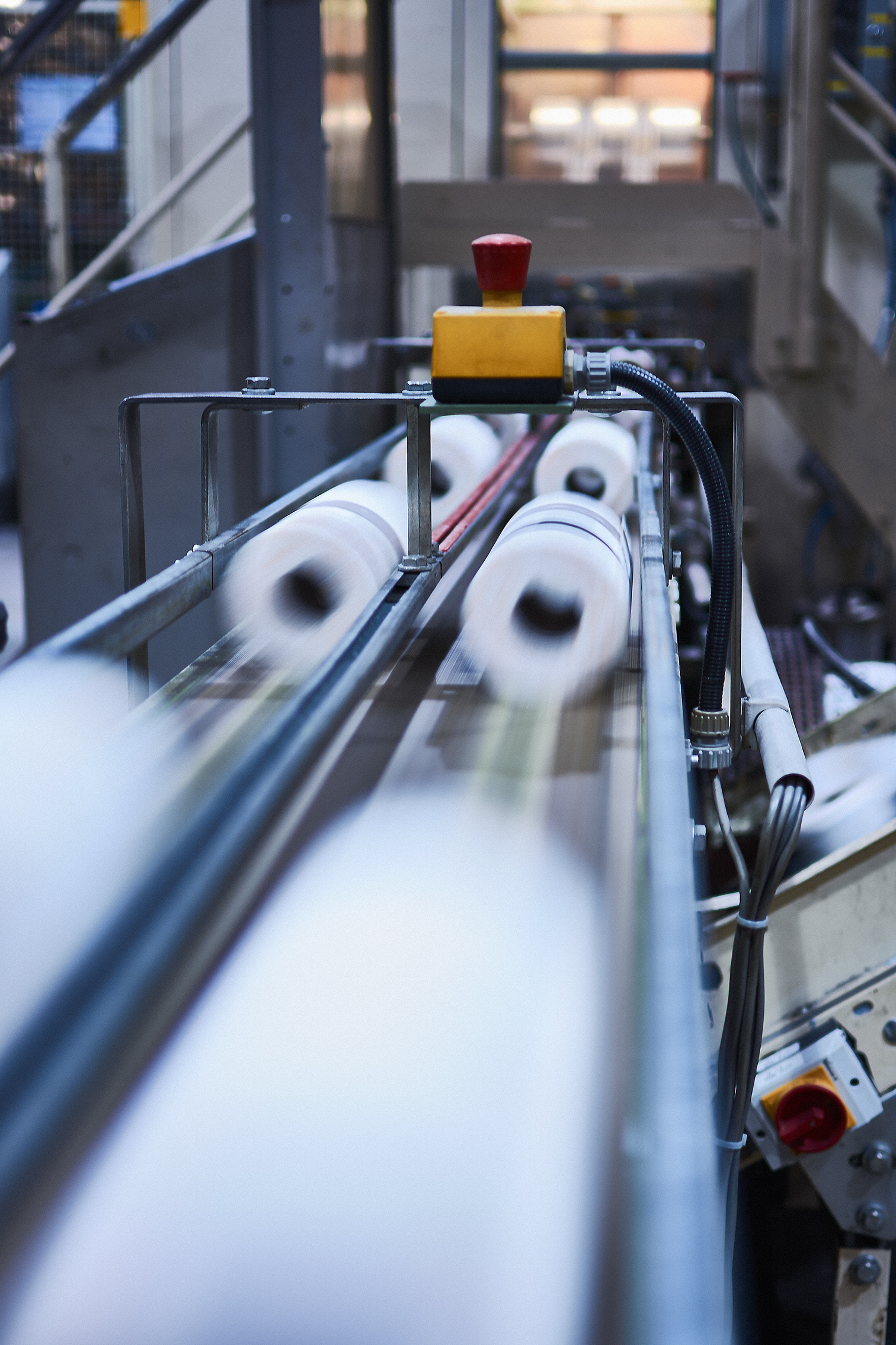 Ein Einblick in die Produktion unserer Hygienepapiere am Standort Düsseldorf